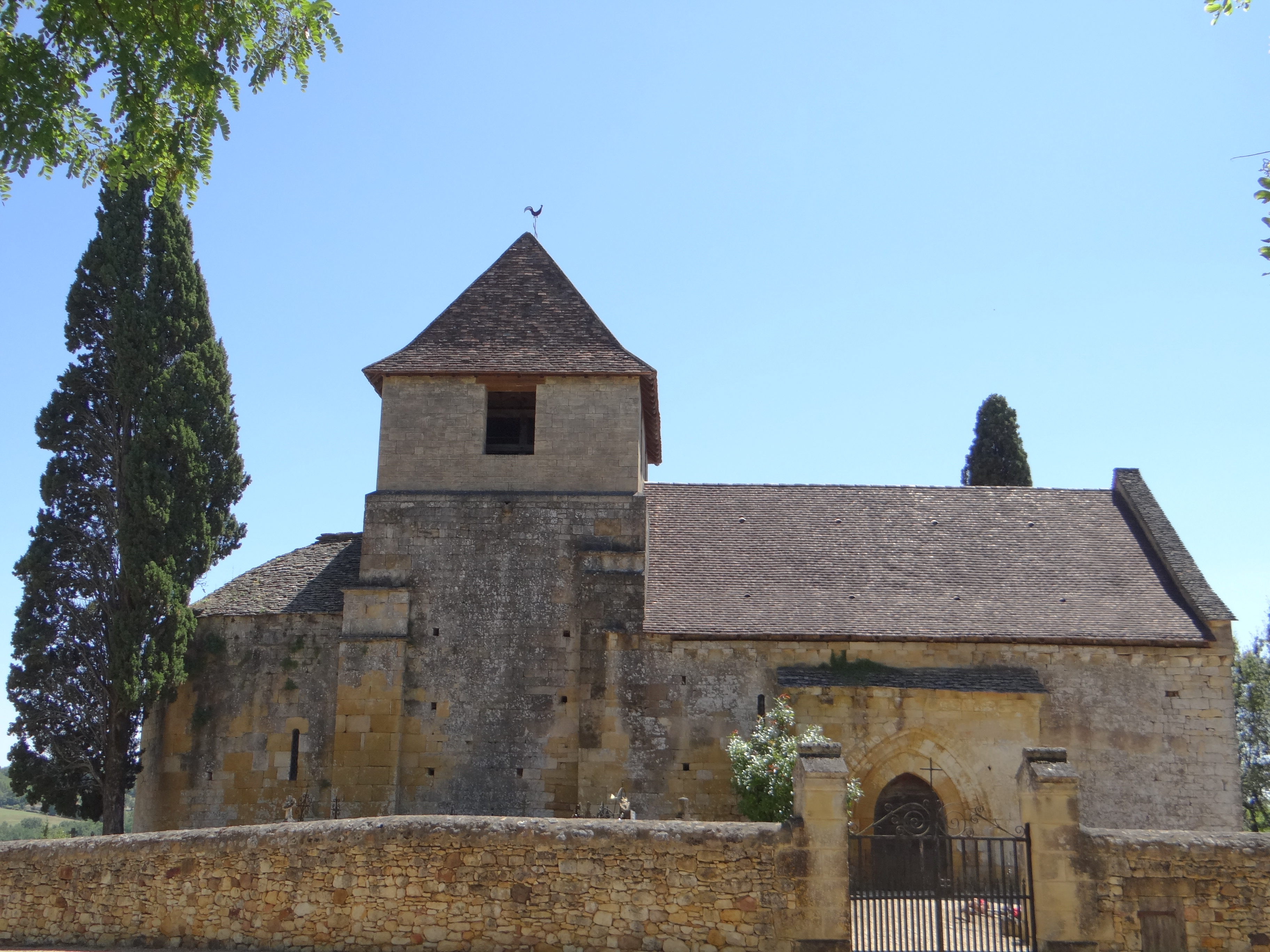 Castels - Église Saint-Martin du Vieux-Castel - Côté nord